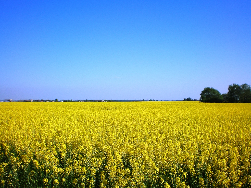 Rapsų laukas. Kėdainių raj., Josvainių sen. 2007.05.20 Foto: Hugo.arg